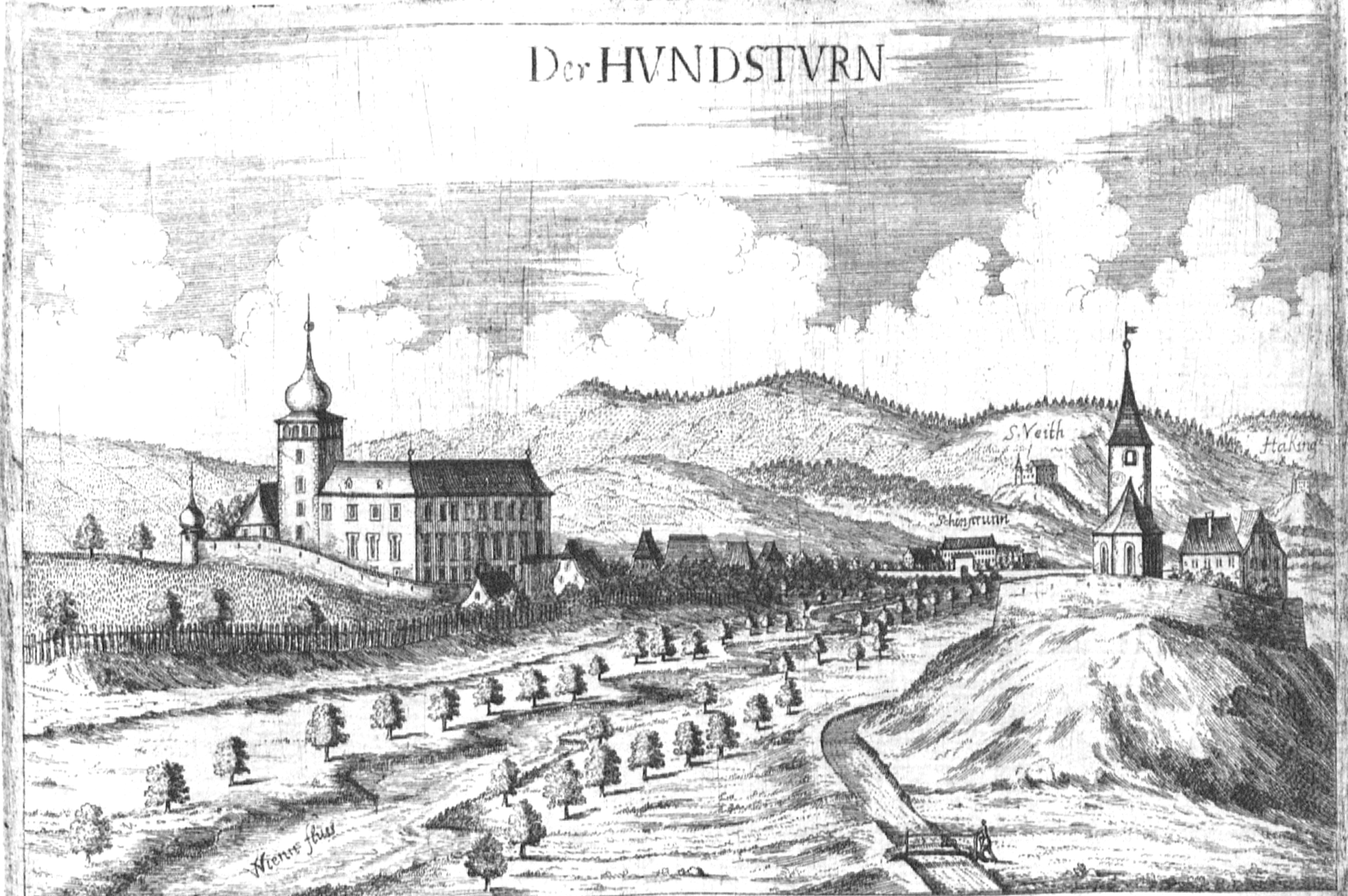 Schloss Hundsturm mit Kirche St. Ägyd